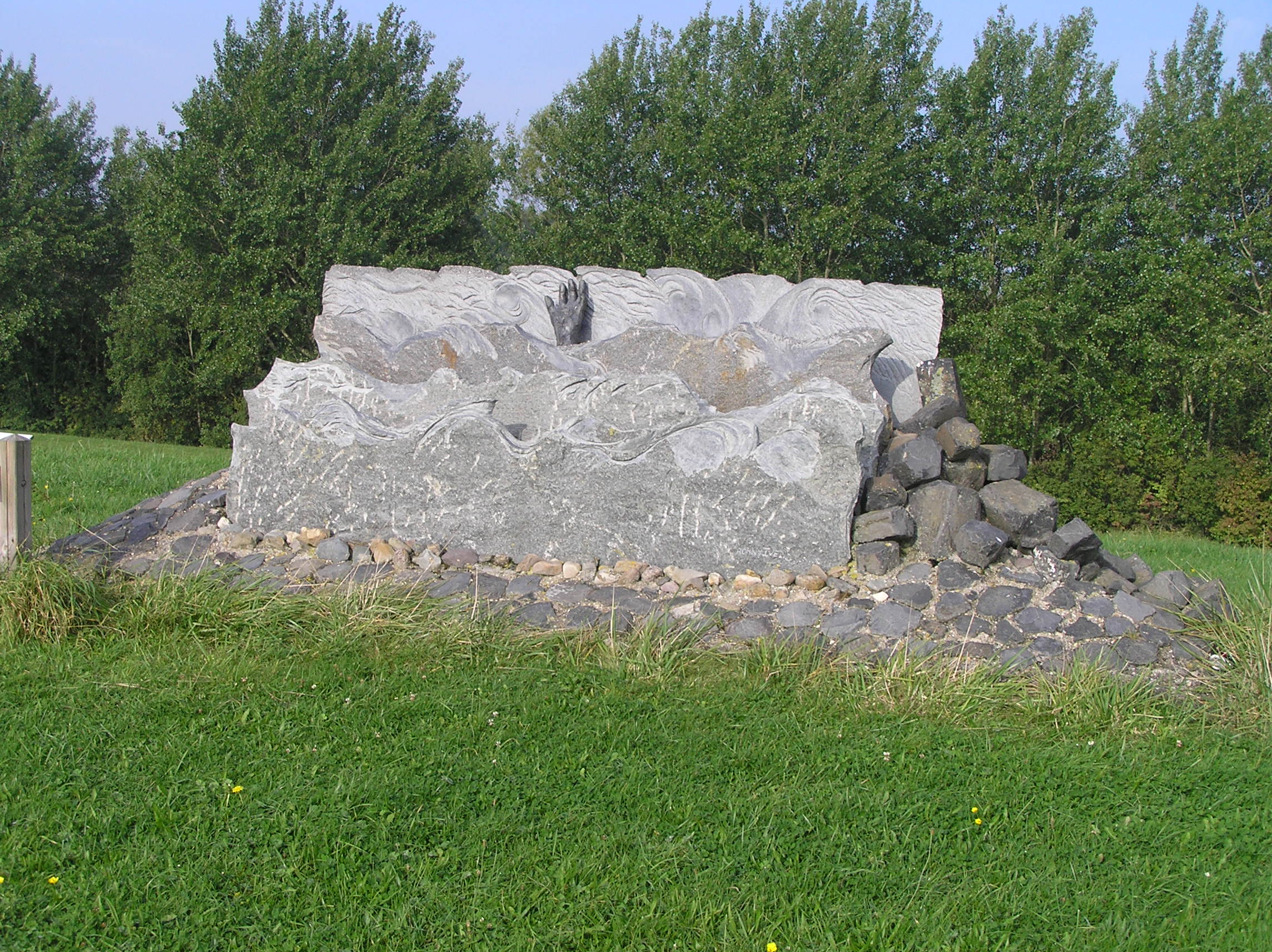 Monument ter nagedachtenis aan de overledenen van de watersnoodramp 1953 uit Wolphaartsdijk. Ontwerp Marjolein Groot Nibbelink, uitvoering Ronny Ivens, 2005.